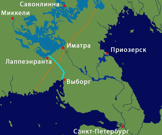 水色の線がサイマー湖とヴィボルグを結ぶサイマー運河